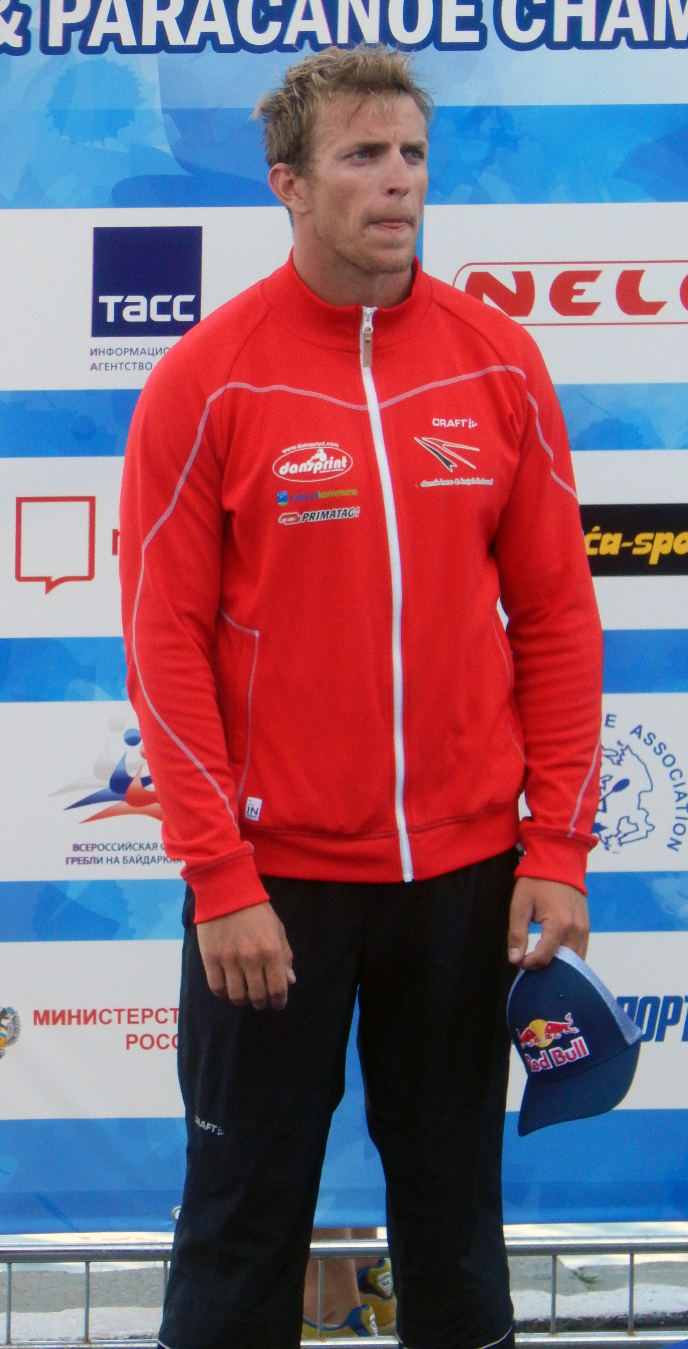 Чемпионат Европы по гребле на байдарках и каноэ 2016. Датский гребец-байдарочник Рене Поульсен, серебряный призёр чемпионата Европы на дистанции 5000 метров